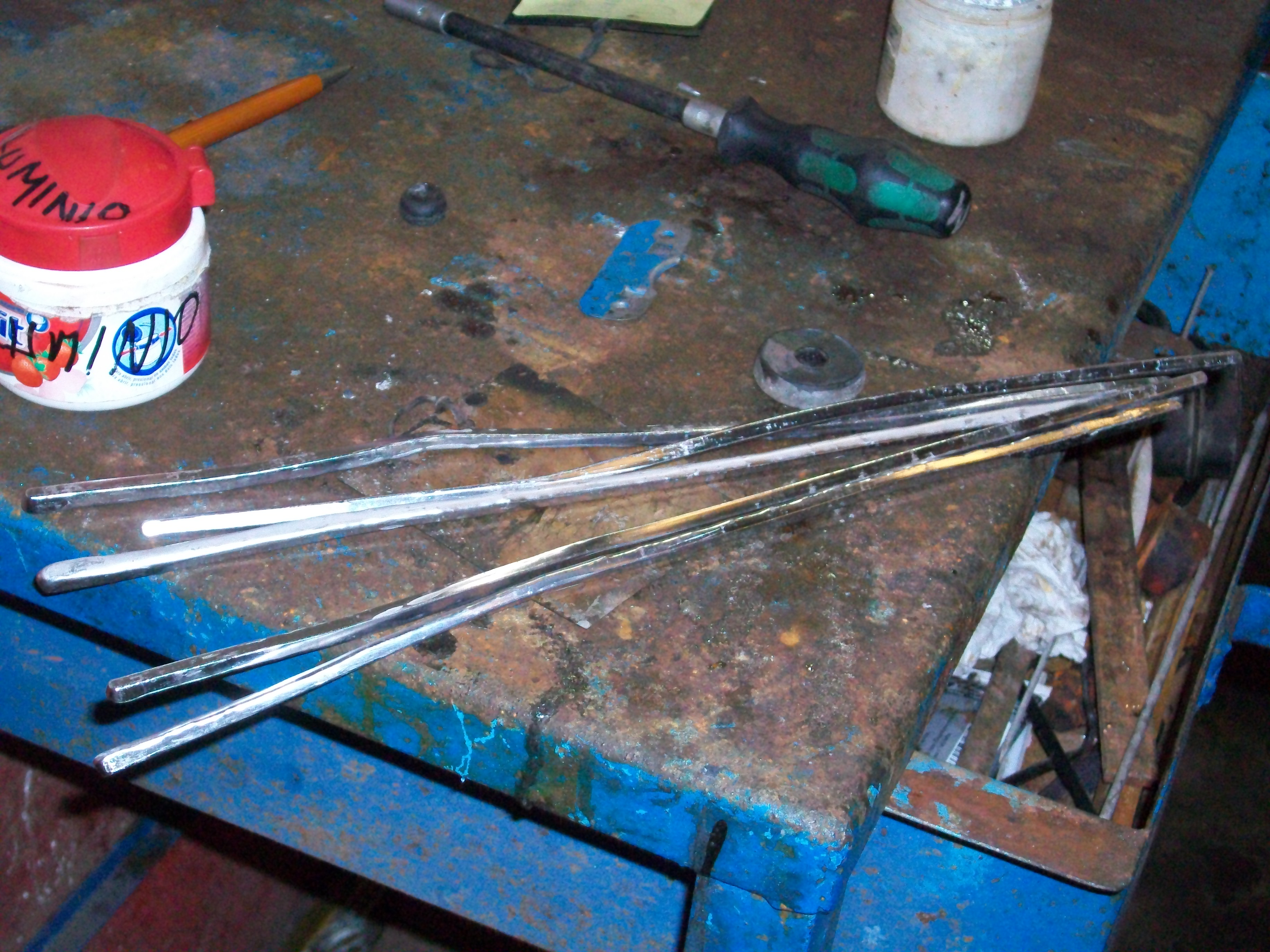 Soldadura autogena utilizando material de aportacion.